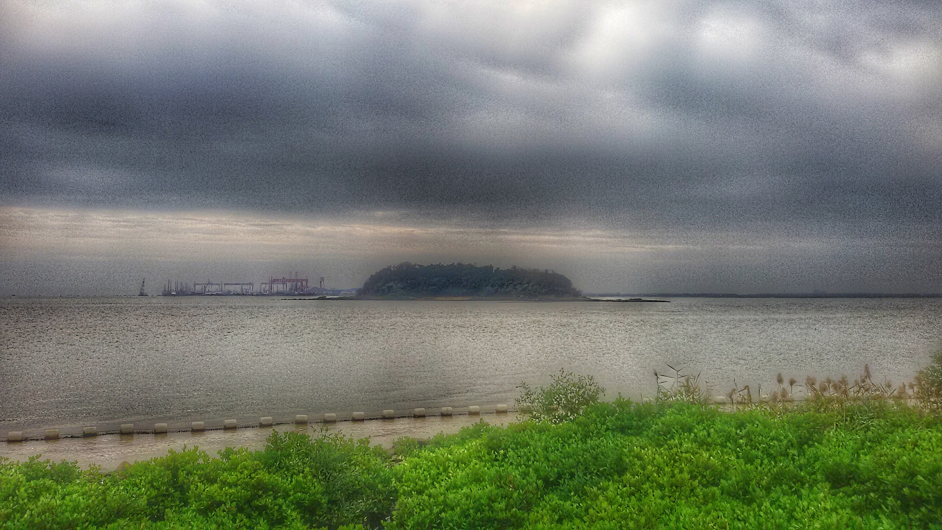 粵語: 鳧洲